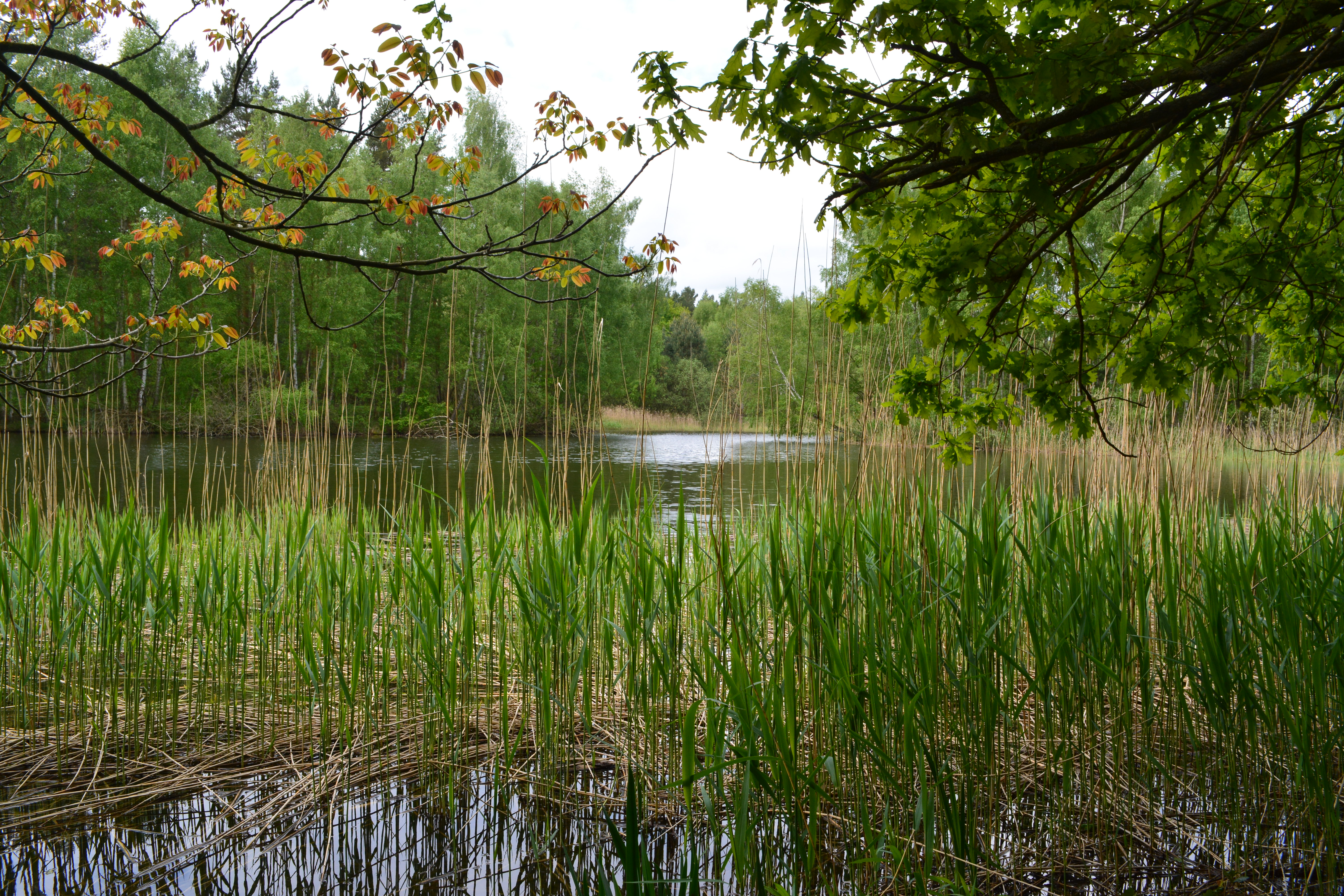 Blick auf das Naturschutzgebiet „Großer und Kleiner Rohrpfuhl“ im Spandauer Forst in Berlin-Spandau